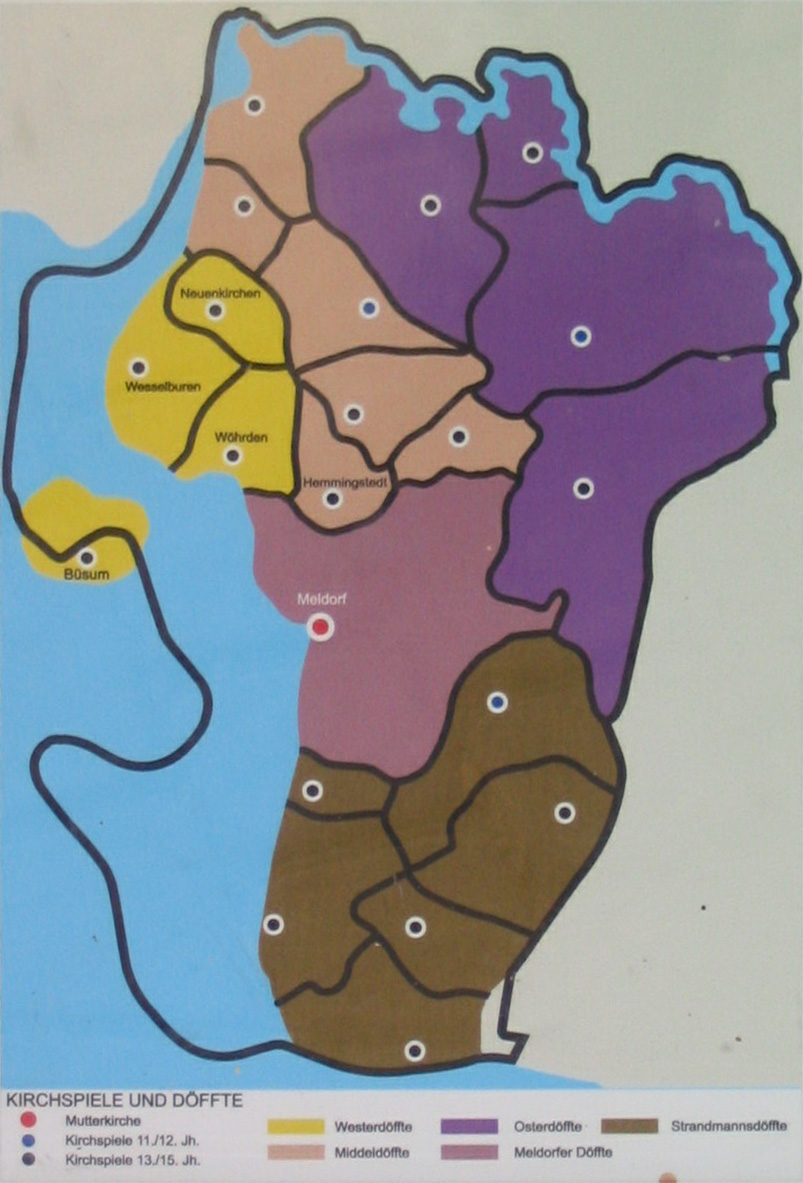 Old Kirchspiele in Dithmarschen (in black:todays coastline)